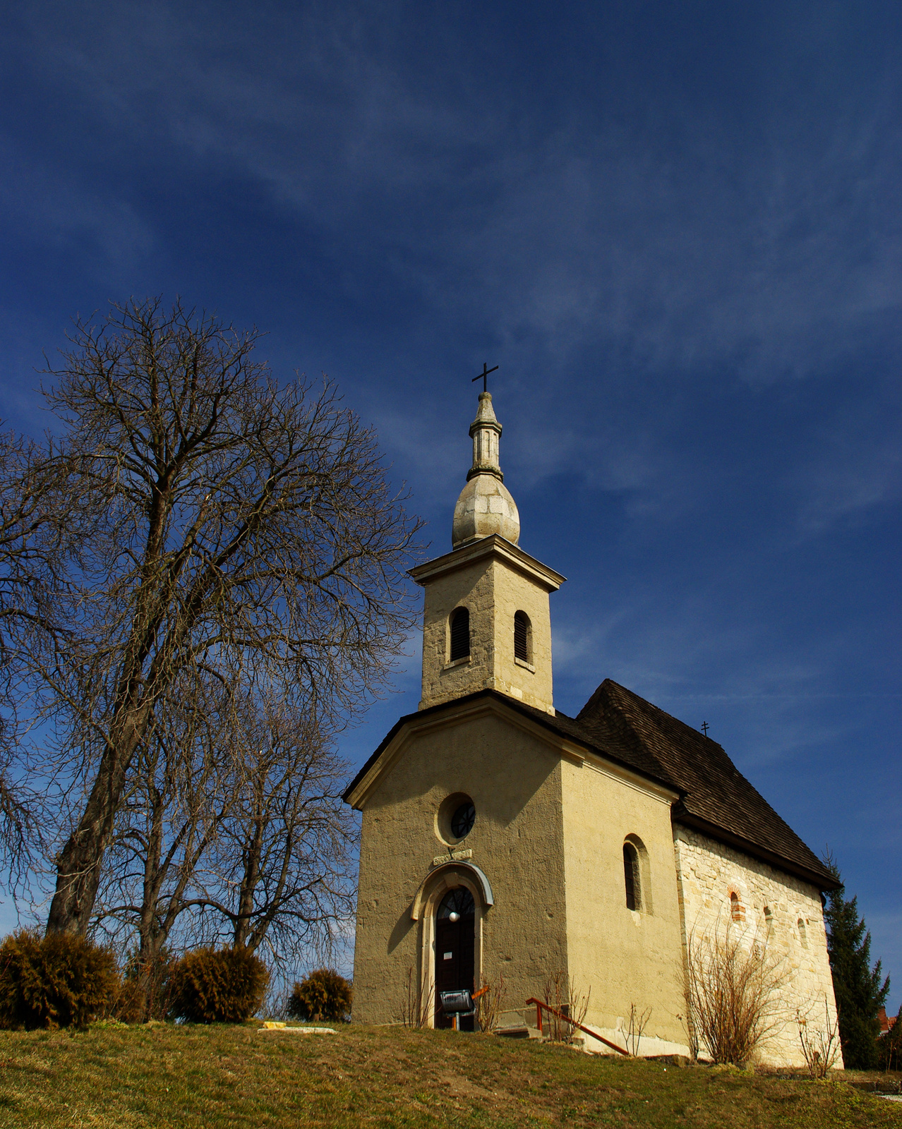 Sarlós Boldogasszony római katolikus templom (Tarnaszentmária, Egri út) This is a photo of a monument in Hungary. Identifier: 5869